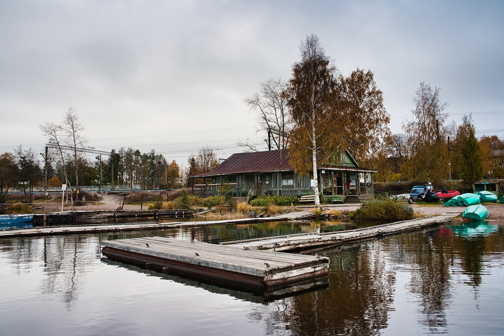 Лодочная станция в Приозерске